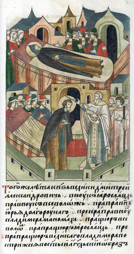 ЛИЦЕВОЙ ЛЕТОПИСНЫЙ СВОД В том же году князь великий Дмитрий Александрович, внук Ярославов, правнук Всеволодов, праправнук Юрия Долгорукого, препраправнук Владимира Манамаха, (потомок) пращура Всеволода, прапращура Ярослава, препрапращура великого Владимира, постригся в святой ангельский образ [и в схиму и преставился;]